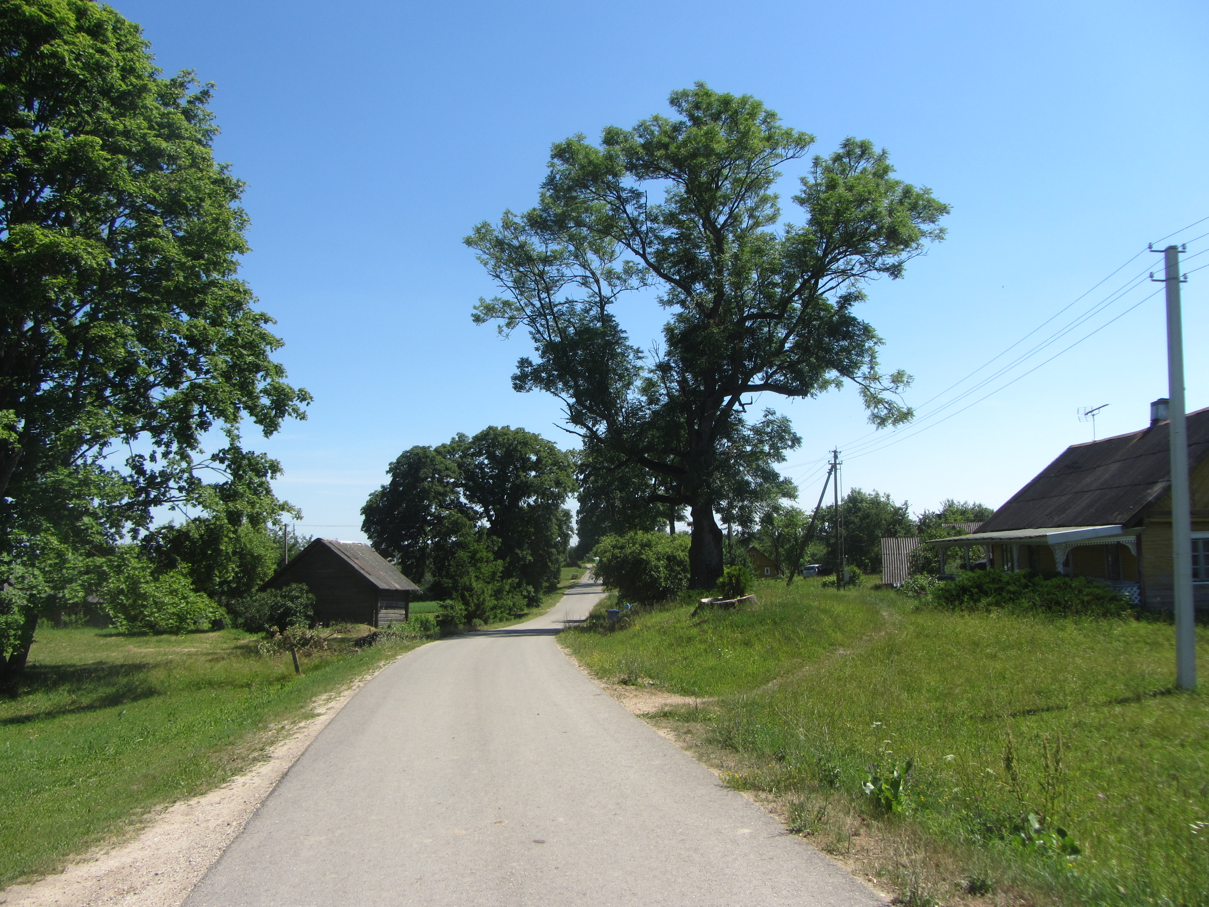 Meškasalis 64121, Lithuania